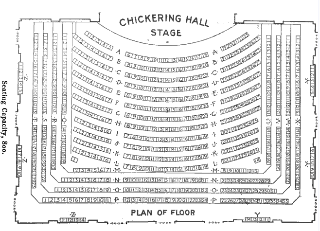 Boston, Massachusetts